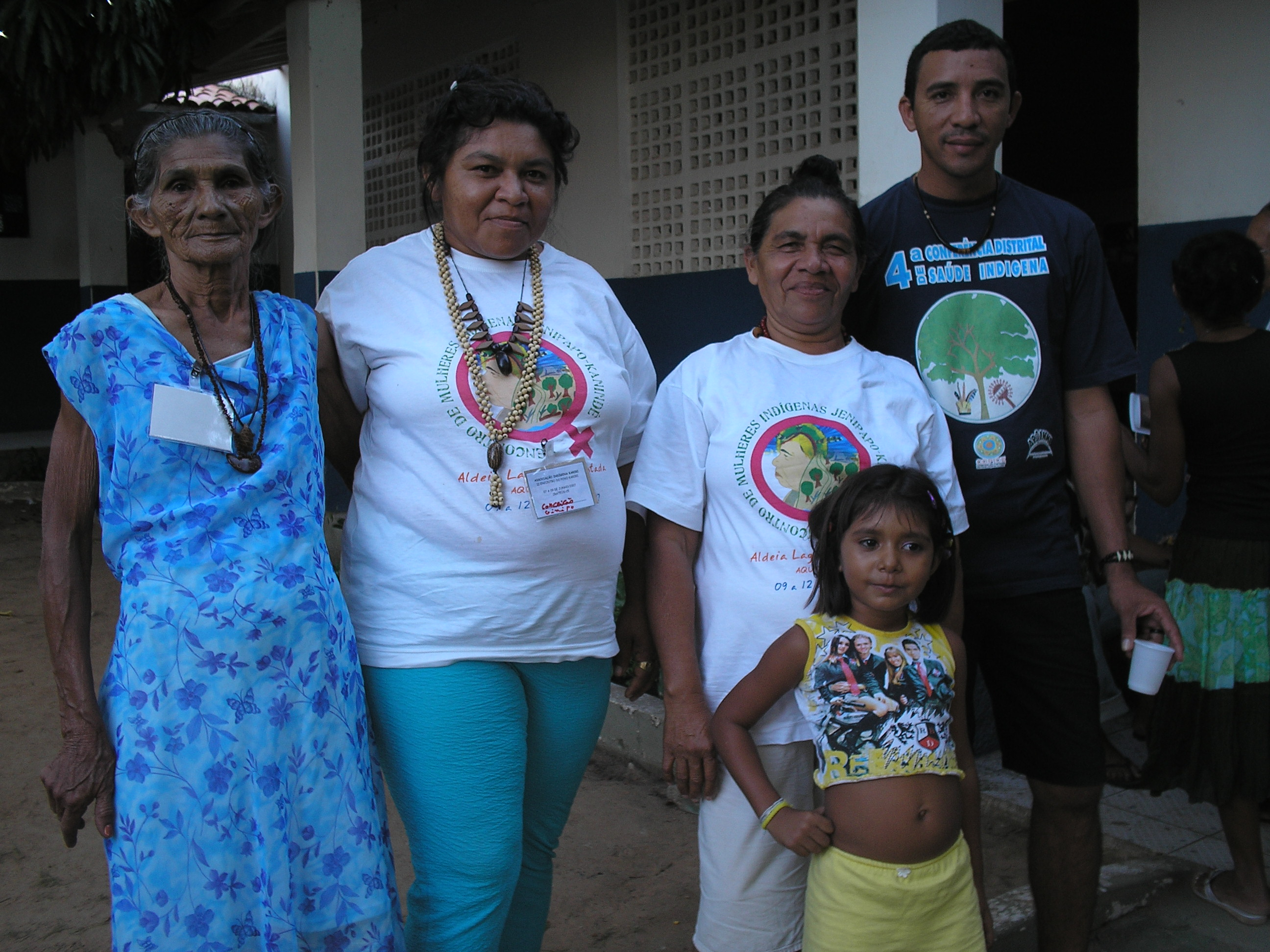 Foto tirada durante o segundo encontro do povo Kariri. Crateús - Ceará. Junho de 2007.